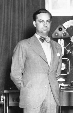 Eduardo Blanco Amor con Manuel Azaña en la emisora española E. A. Q. de Radiodifusión Ibero-Americana, de la Sociedad Transradio Española. Madrid.